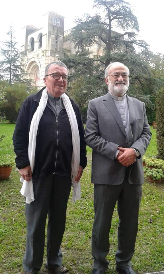 Les Eveques Vincent Landel et Cristóbal López Romero, eveques de Rabat